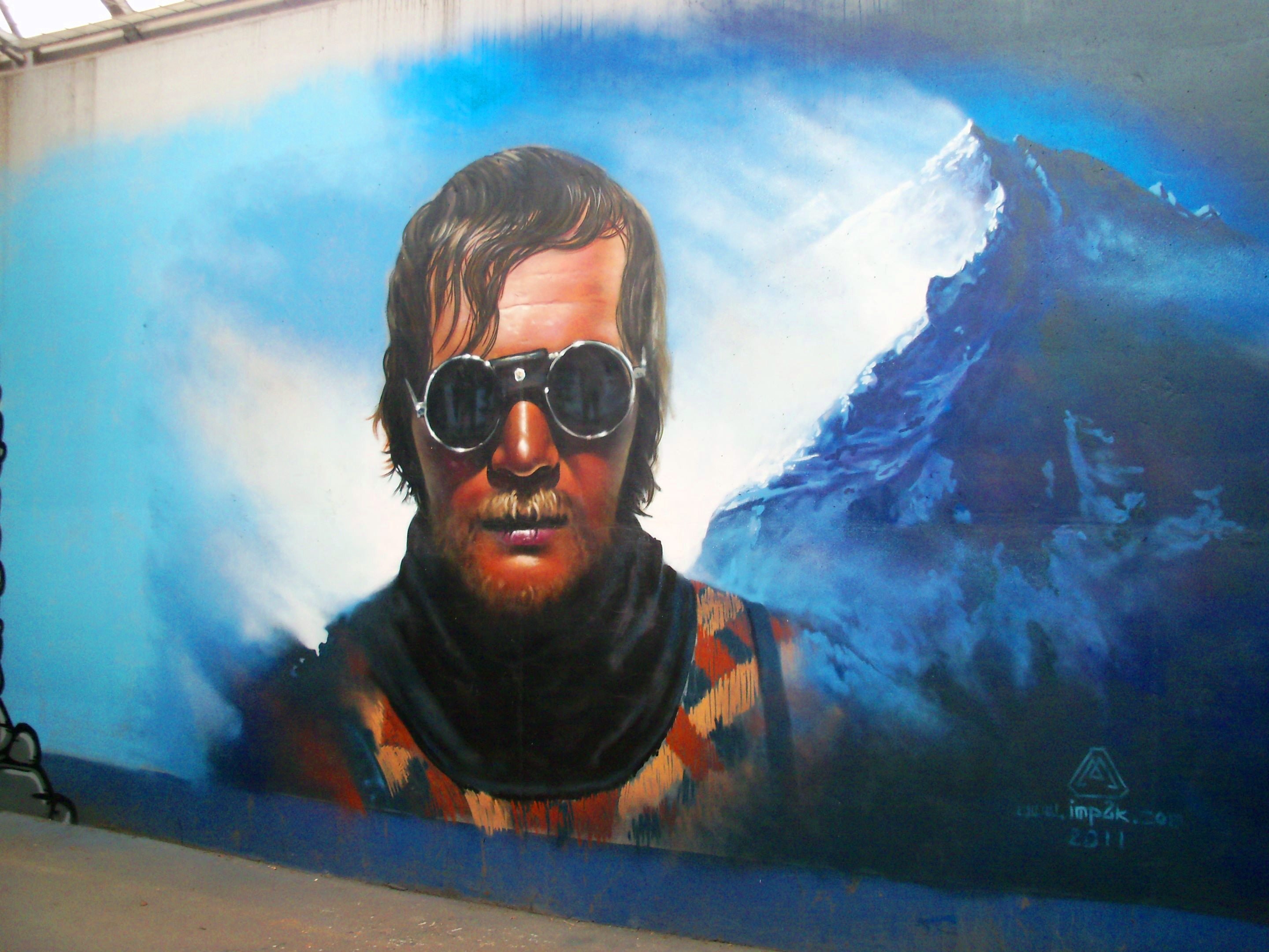 Katowice - graffiti, przedstawiające Jerzego Kukuczkę, wykonane w marcu 2011 w przejściu podziemnym między Bogucicami a osiedlem Walentego Roździeńskiego (tzw. "Gwiazdy")